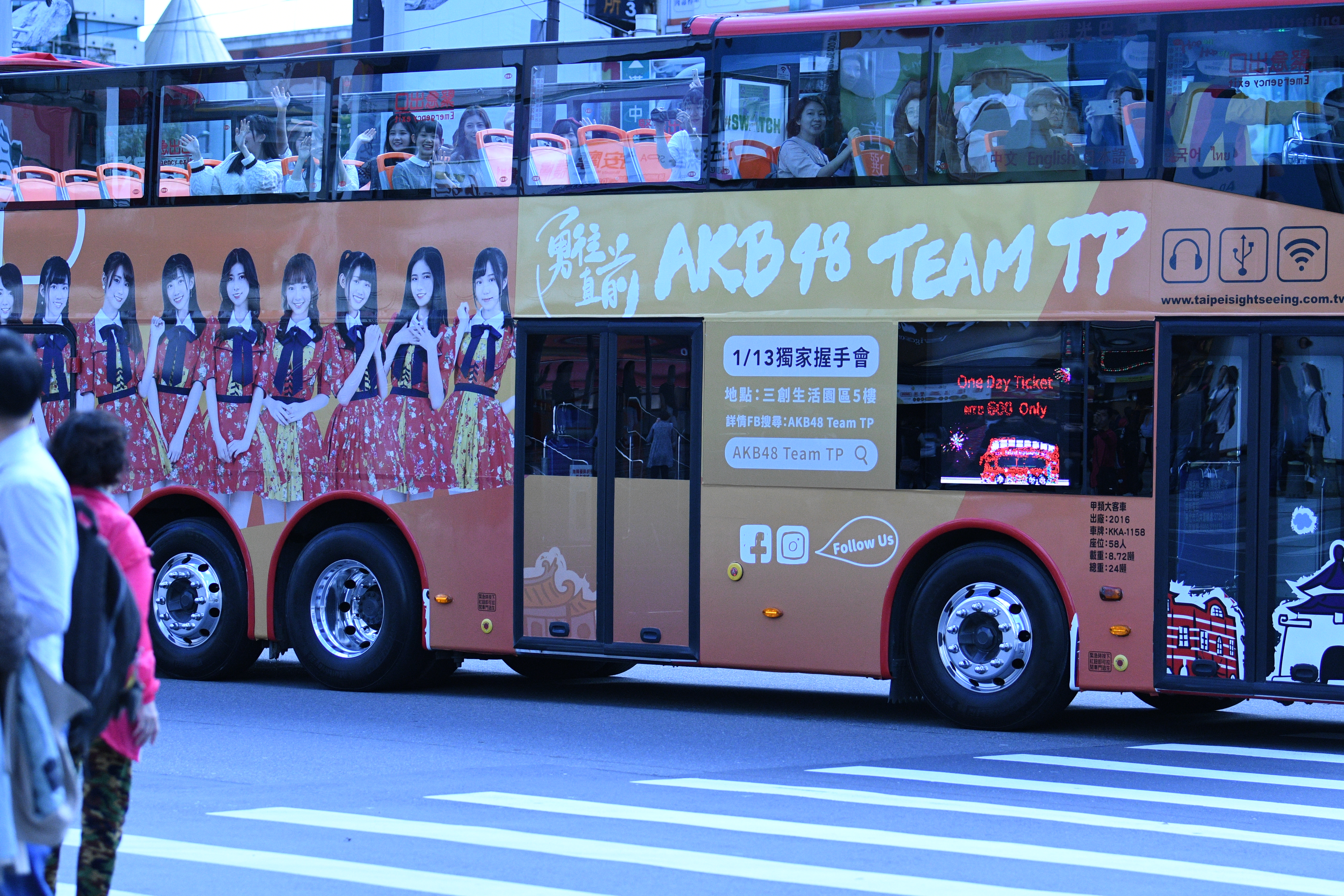 2018.01.04 AKB48 Team TP 1st「勇往直前」專屬雙層觀光巴士亮相&快閃見面活動@西門町捷運6號出口前廣場